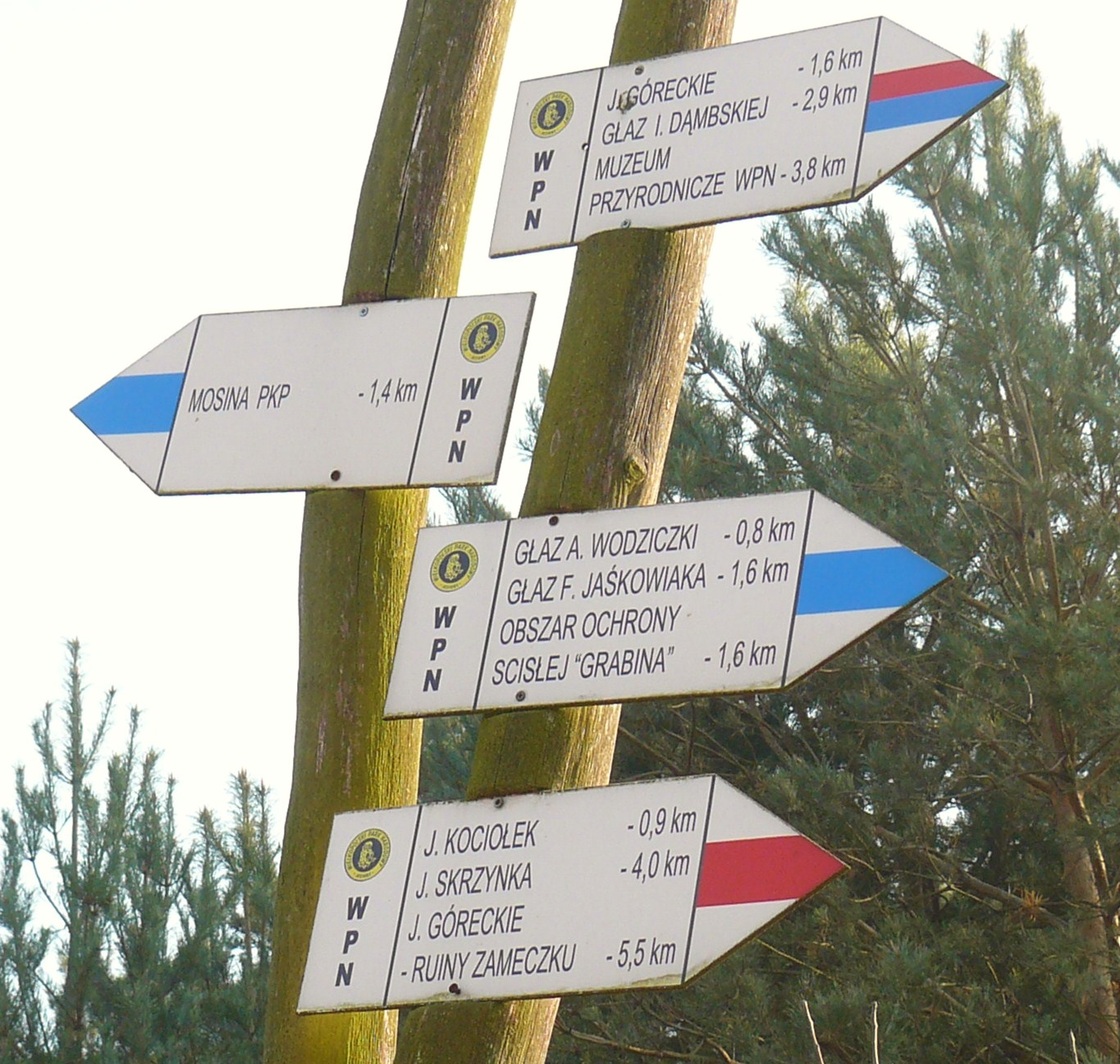 Węzeł szlaków - Mosina Pożegowo.